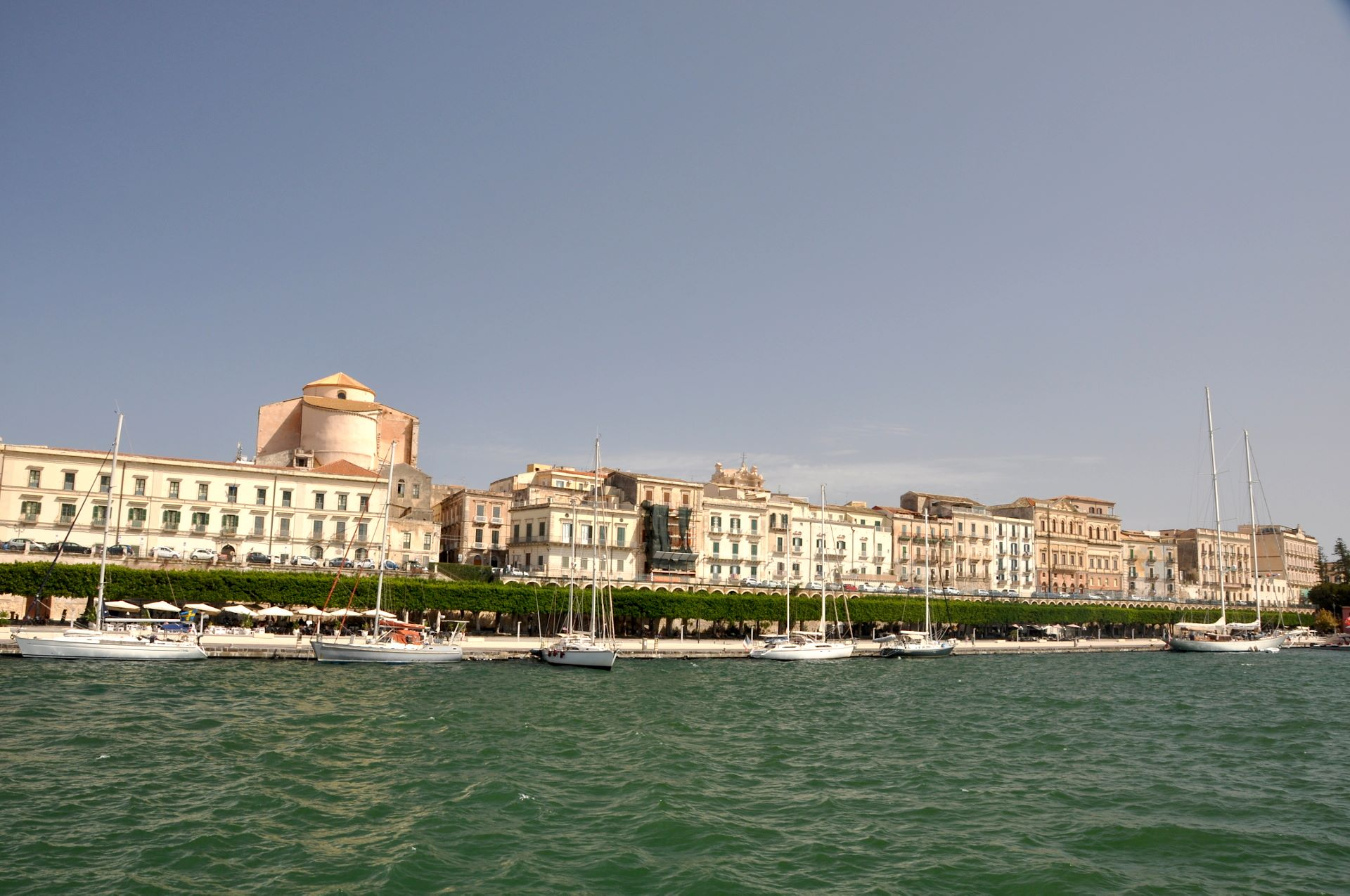 Syracus, Bootsfahrt im Naturhafen